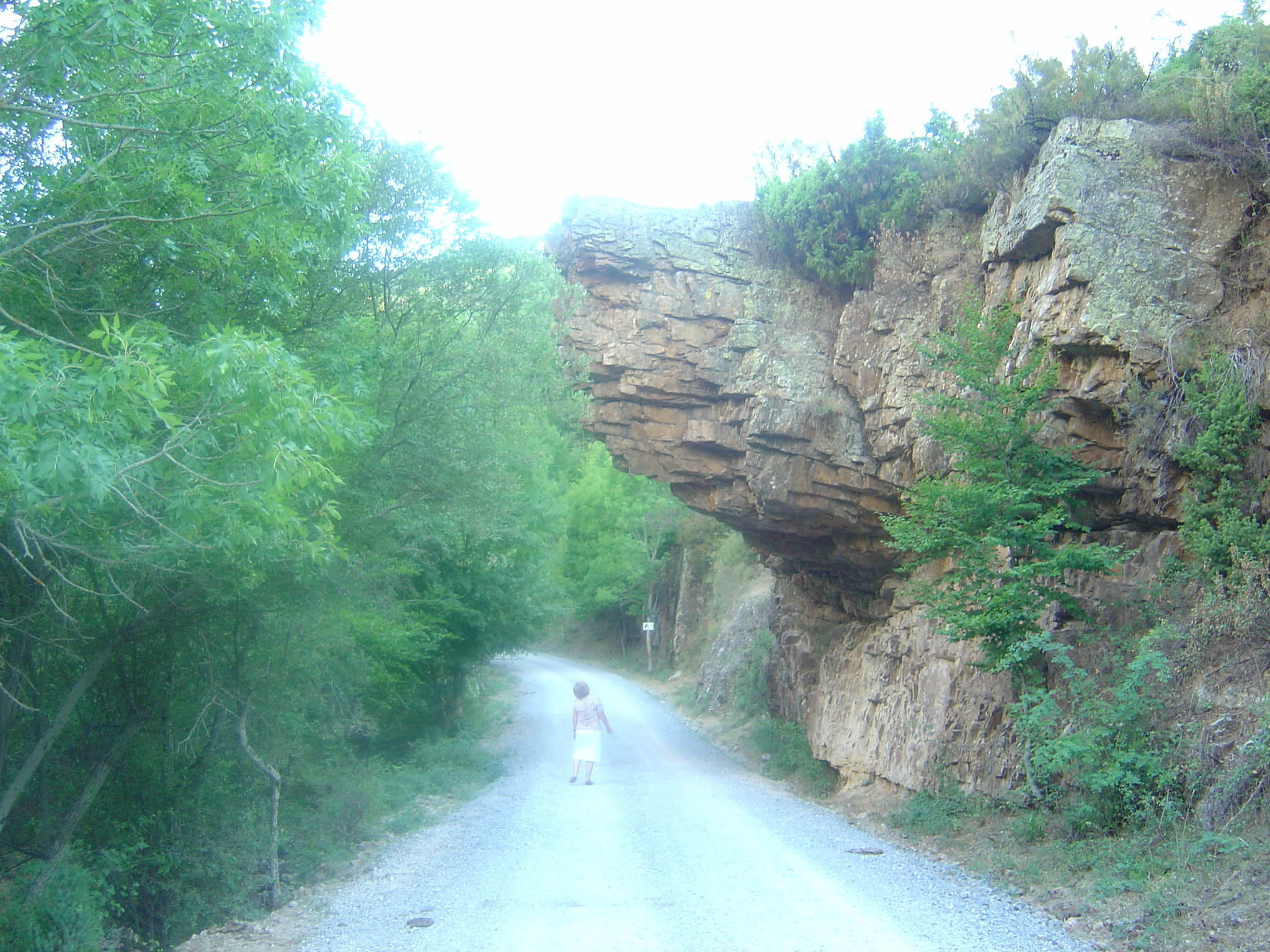 Ajamil. La Rioja. Roca sobre el camino a Monterreal